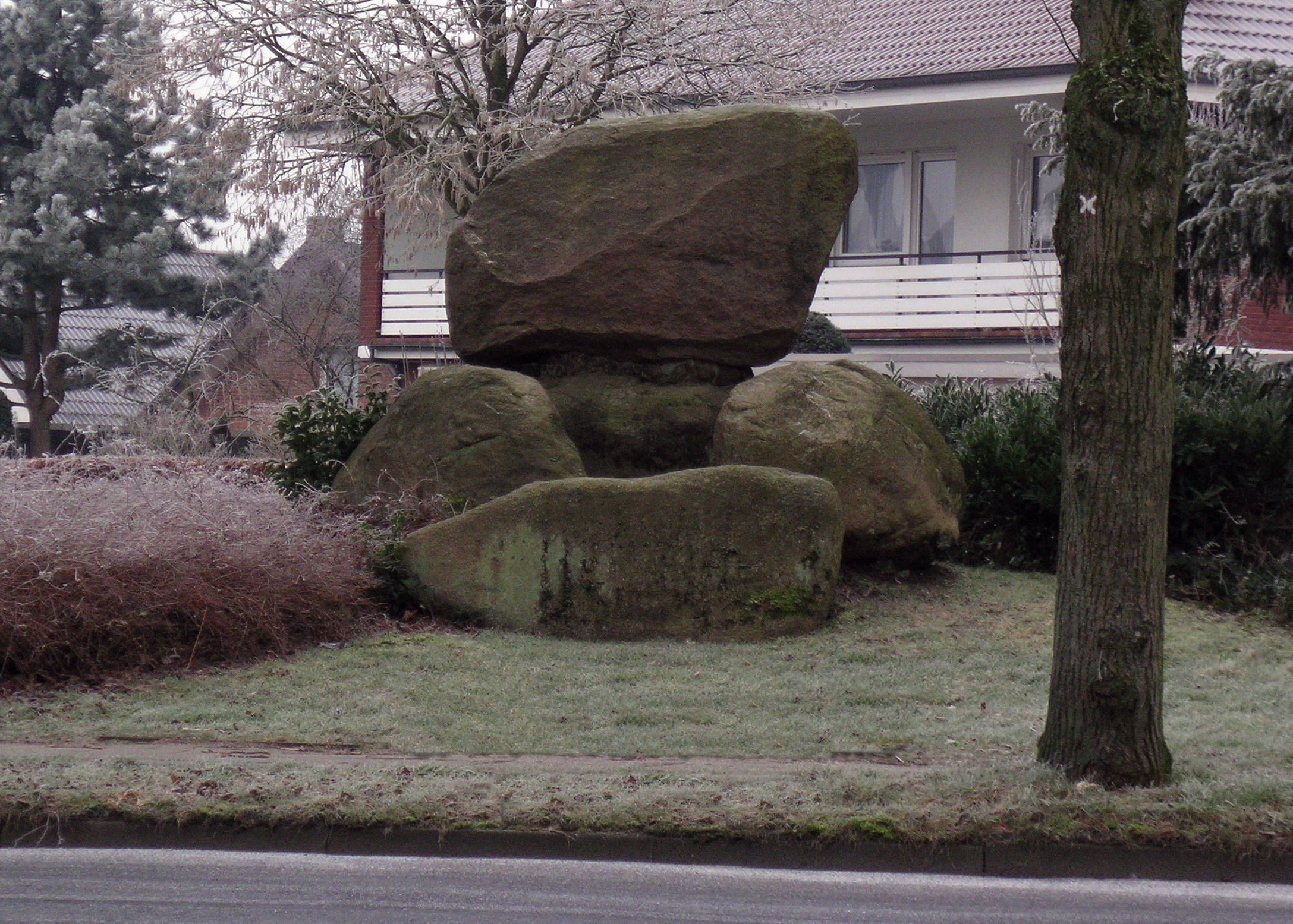 Memorial für Albert Leo Schlageter in Billerbeck